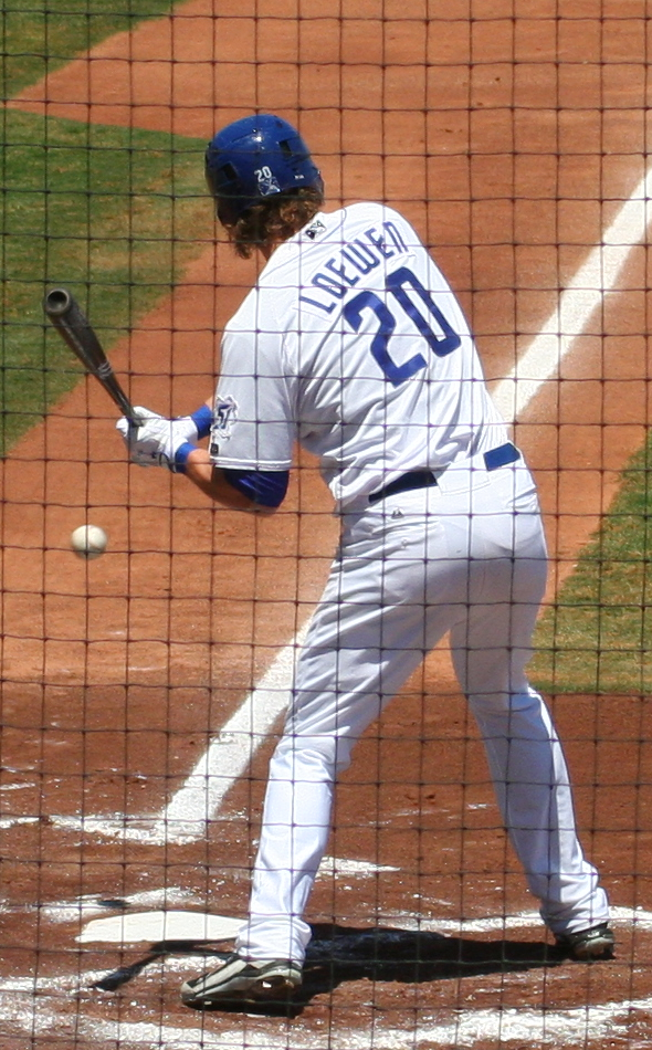 Adam Loewen